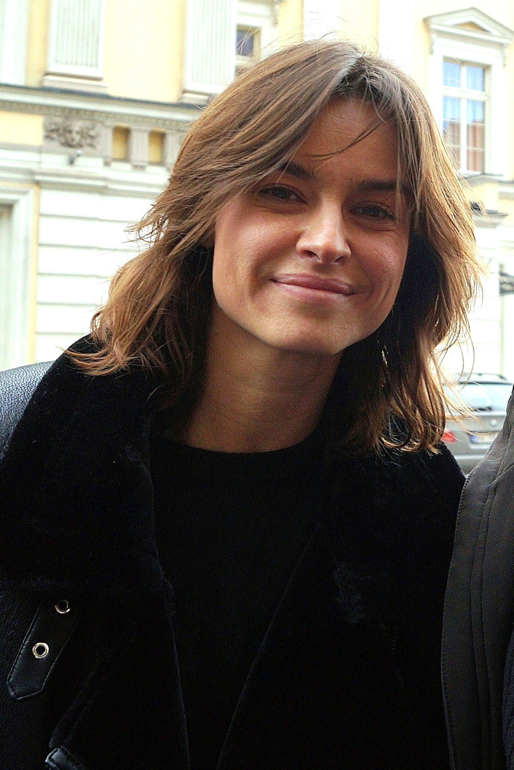 Katarzyna Smutniak, modelka.